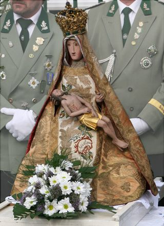 Hennef-Bödingen, Deutschland, Römisch-katholische Wallfahrtskirche Zur schmerzhaften Mutter Gottes, Gnadenbild, Pietà